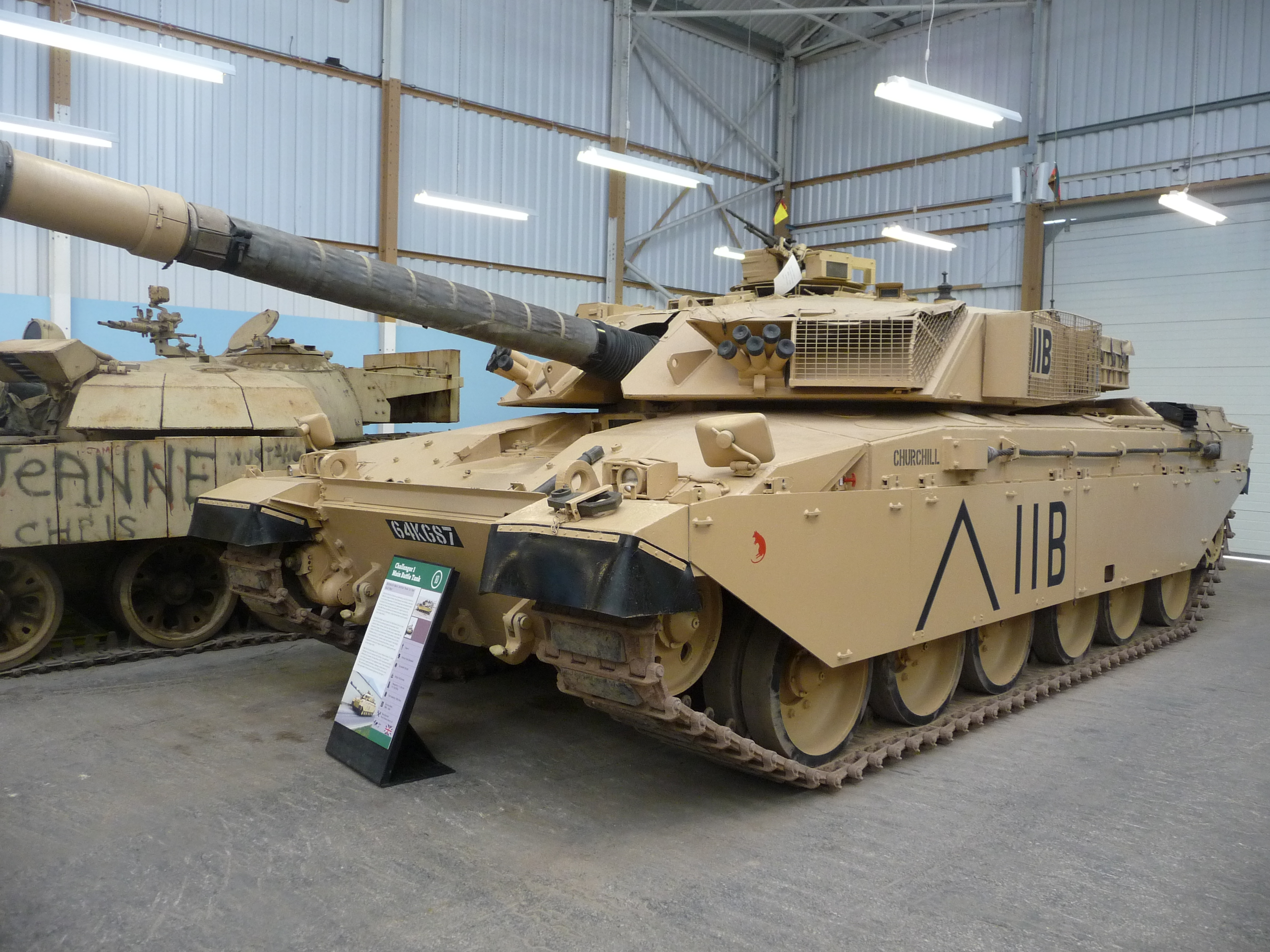 Challenger 1 MBT Mark 3